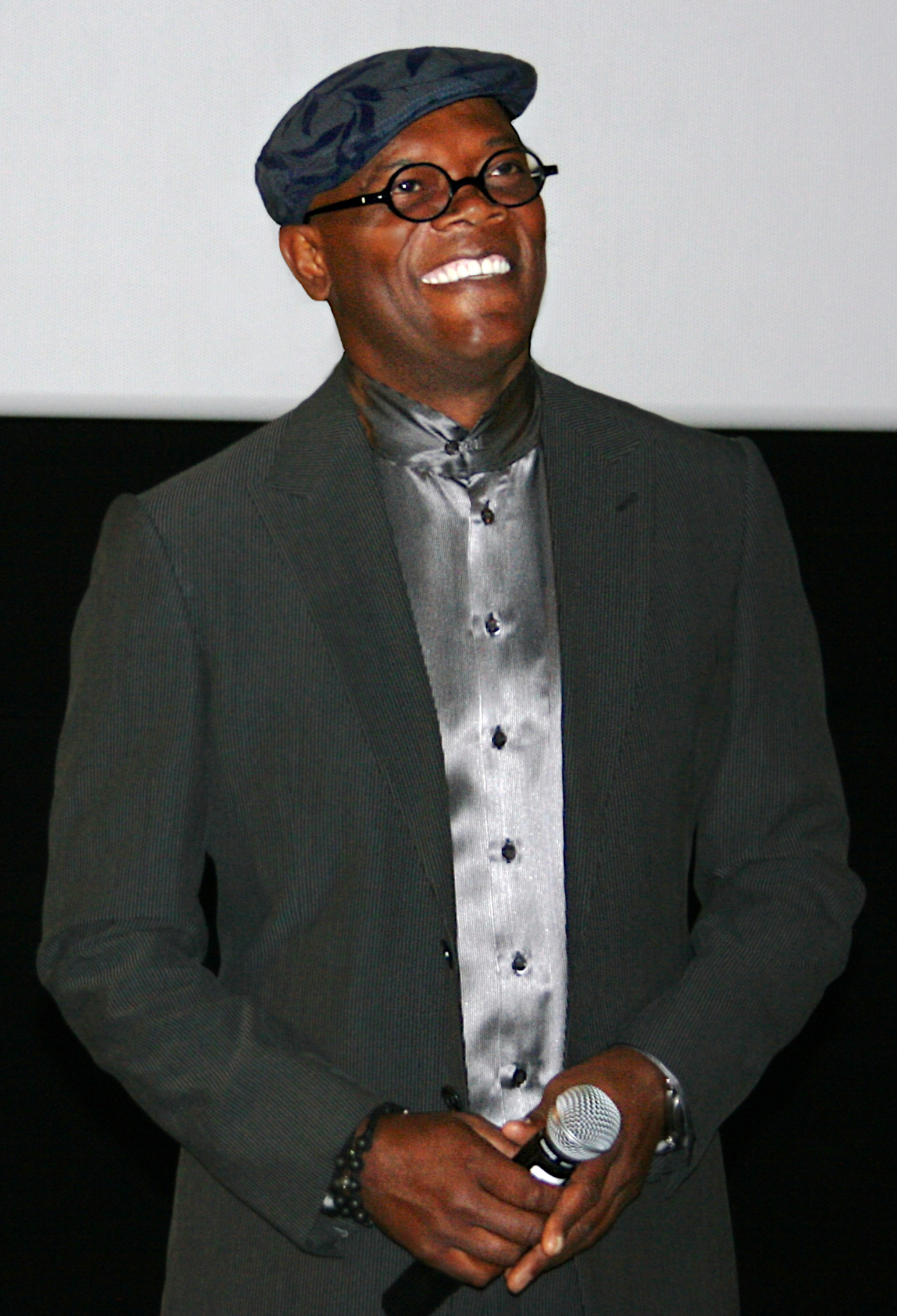 Samuel L. Jackson à l'avant-première de Cleaner diffusée à l'UGC Ciné Cité Les Halles, à Paris.